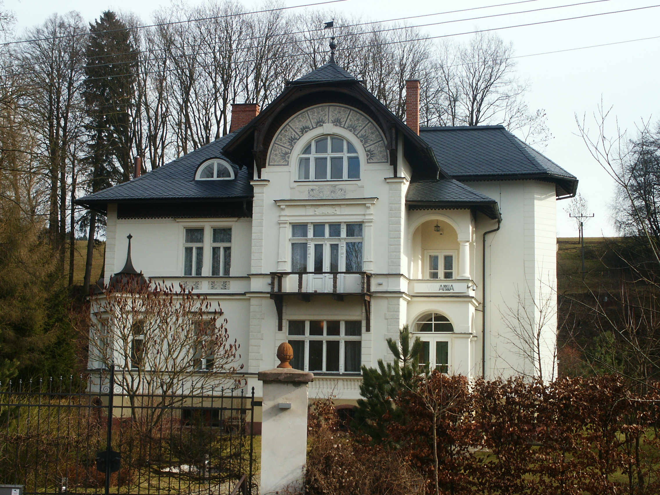 Čistá v Krkonoších - č.p.45, Villa Anna